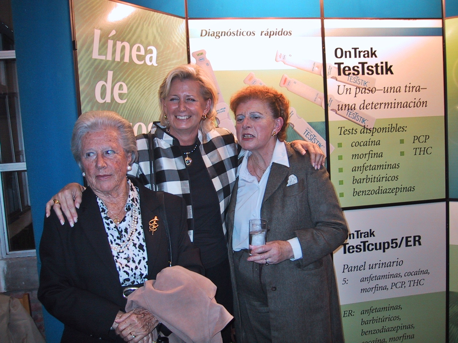 Jenny Pronczuck, en el centro, junto a dos de sus maestras, año 2002 (II Congreso Uruguayo de Toxicologia Clínica)